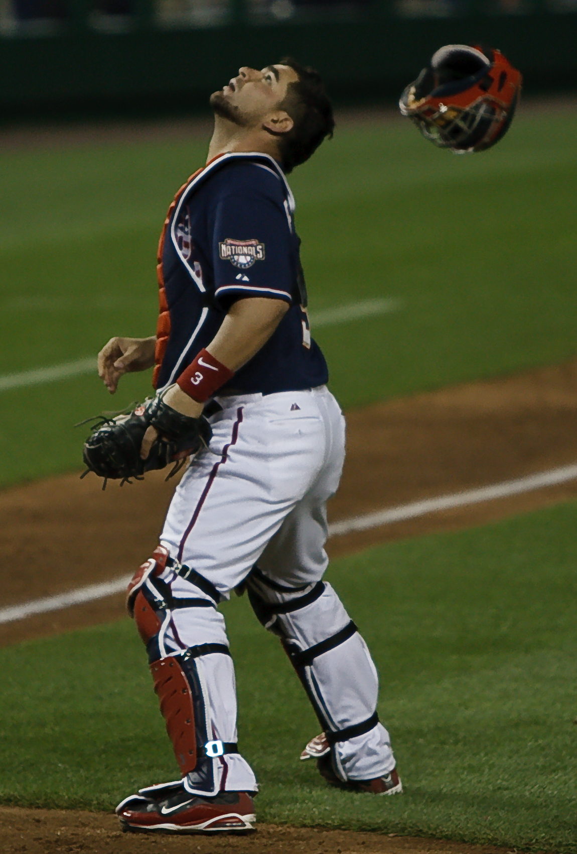 Jesús Flores